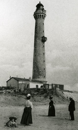 Premier phare de pierre de la pointe de la Coubre